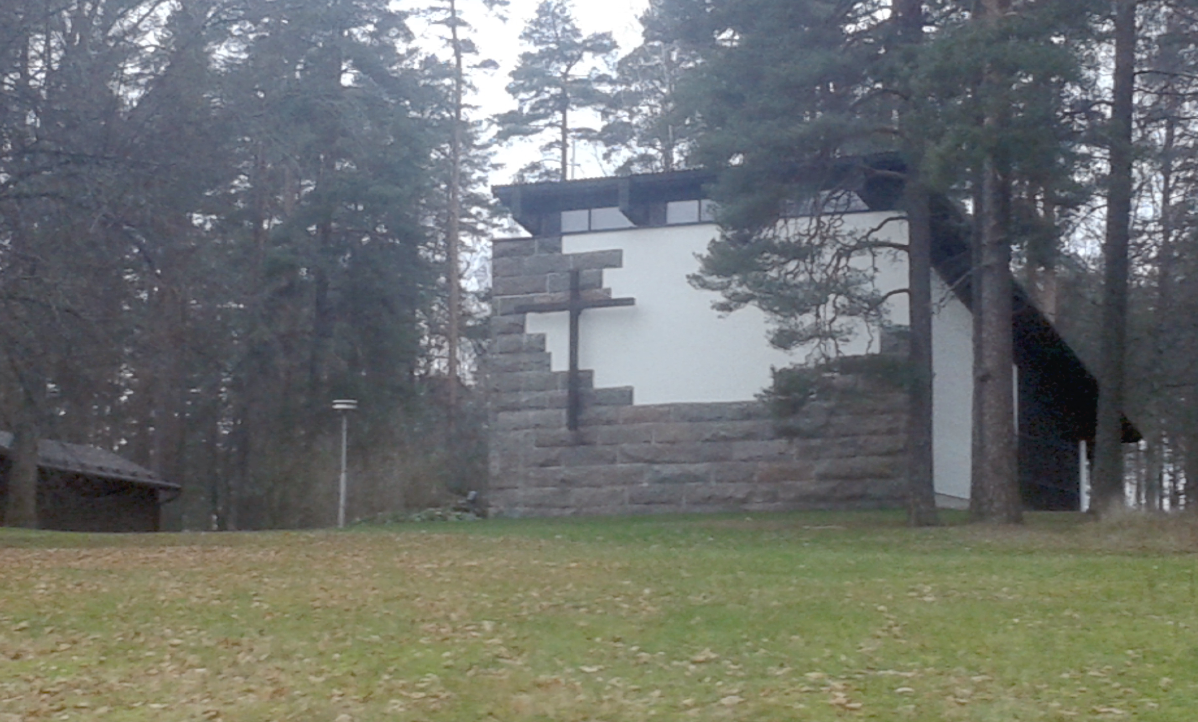 A chapel in Vihtijärvi